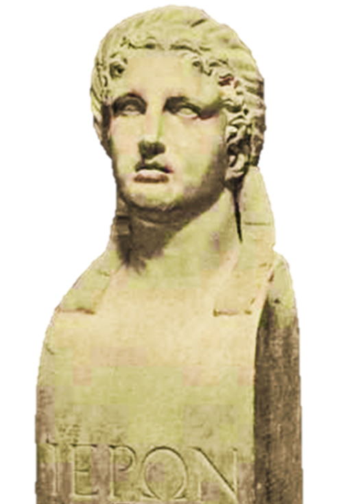 Busto attribuito a Ierone II di Siracusa. Musei capitolini, Roma.